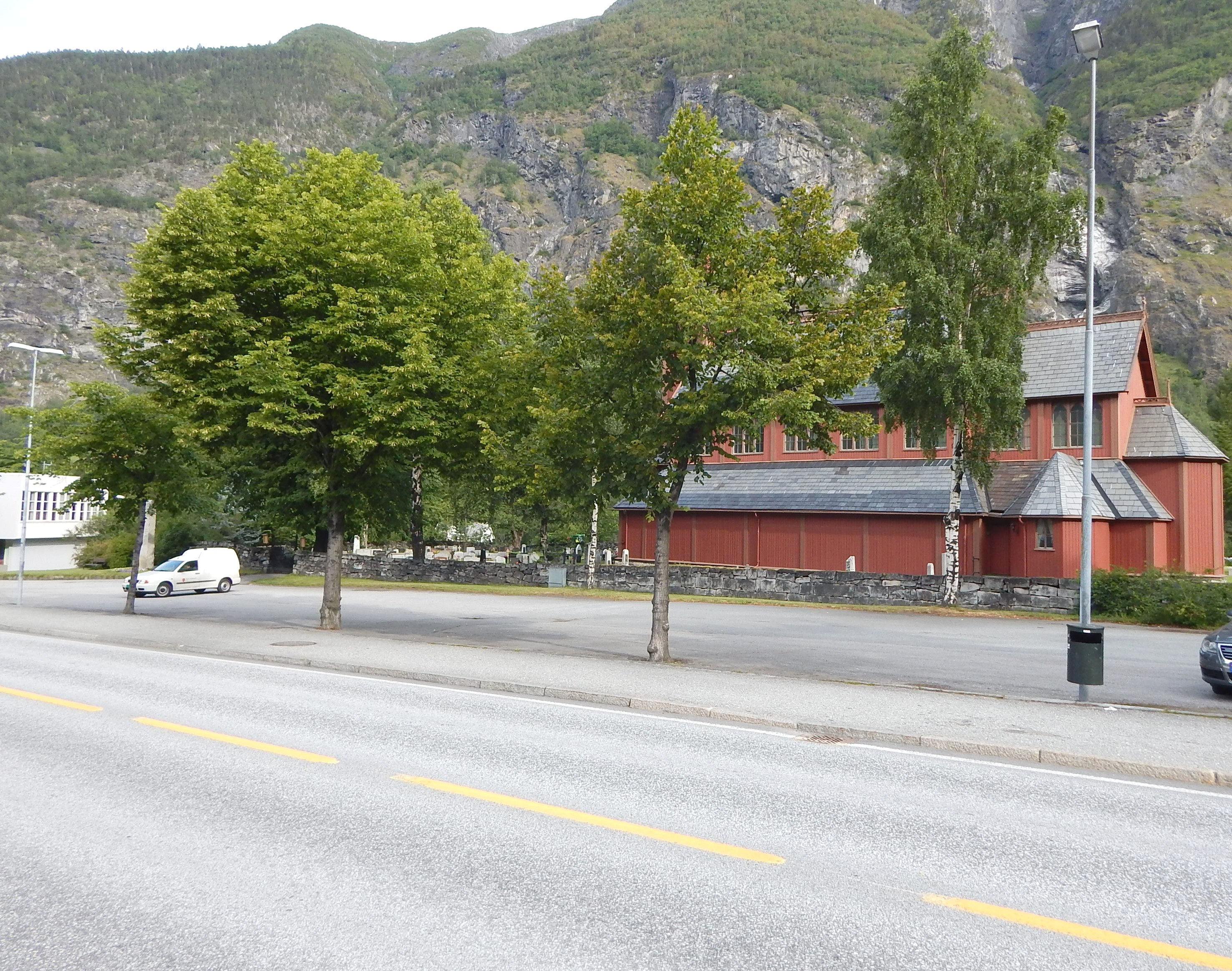 Tangevegen (fylkesvei 303) forbi Årdal kirke